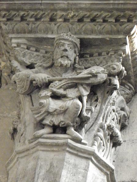 Chapiteau du Roi David à la Primatiale de Vienne